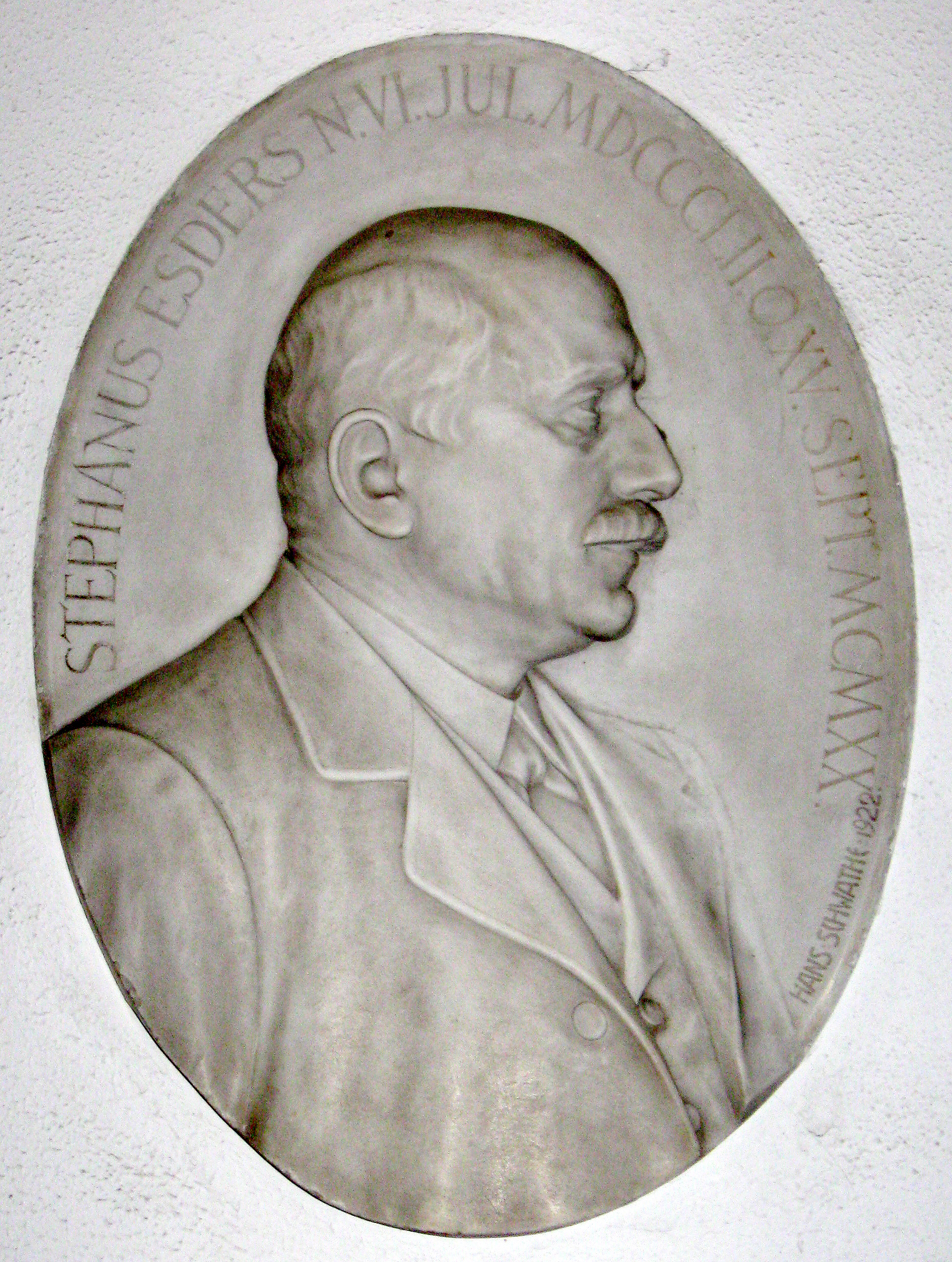 Memorial plaque, Stefan Esders (1852-1920) Kaasgrabenkirche Wien. Sculptor: Hans Schwathe (1870-1950), 1922